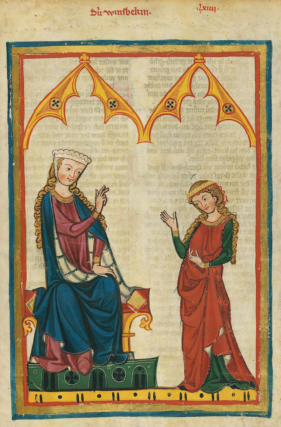 Codex Manesse, UB Heidelberg, Cod. Pal. germ. 848, fol. 217r, Die Winsbekin